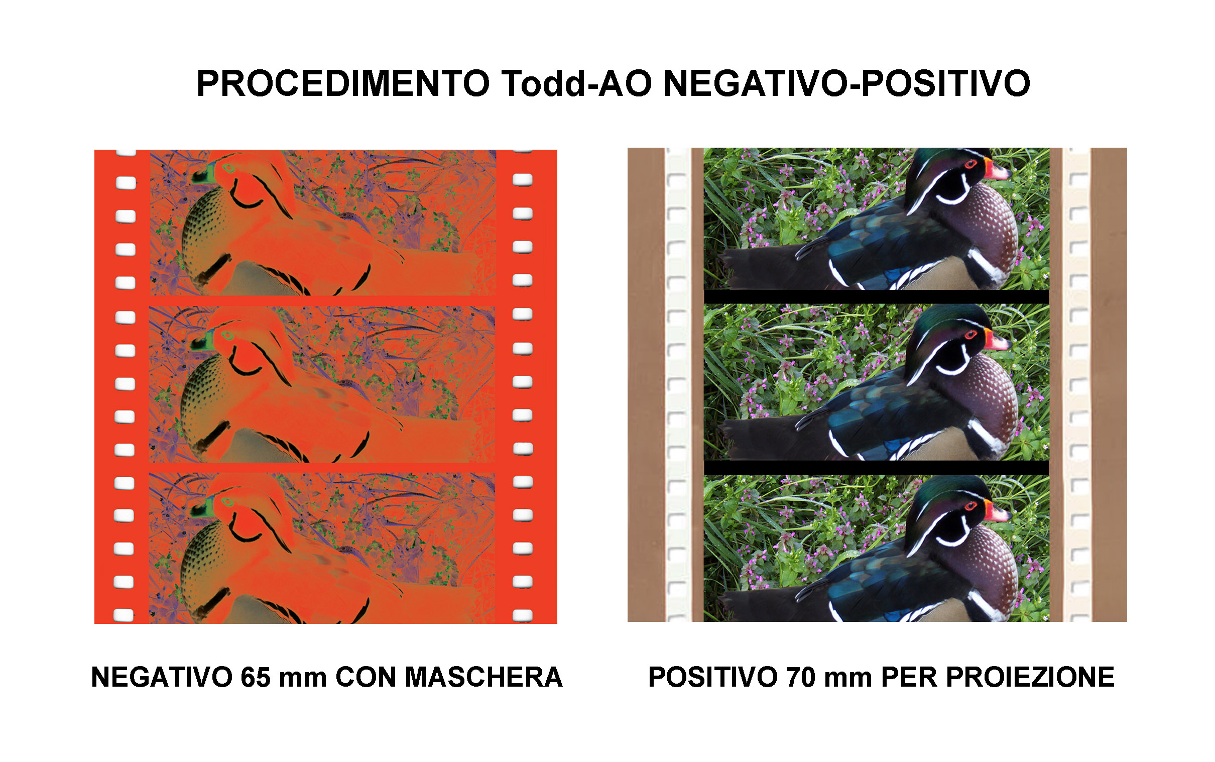 Procedimento Todd-AO. Dal negativo 65 mm con maschera al positivo 70 mm da proiezione (Todd-AO process. From masked 65 mm negative to 70mm positive).